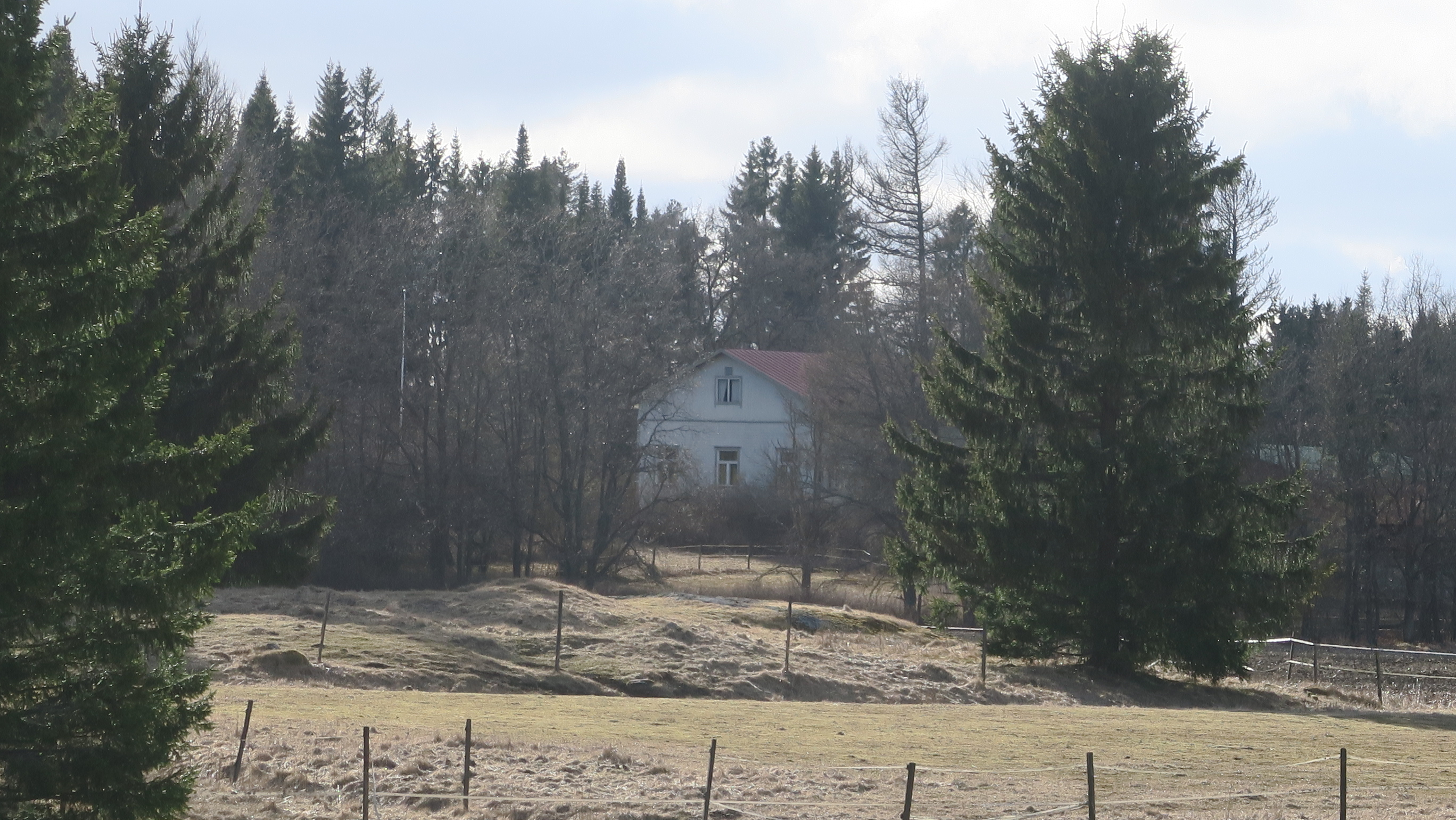 Ortenojan kartano Pöytyällä huhtikuussa 2017